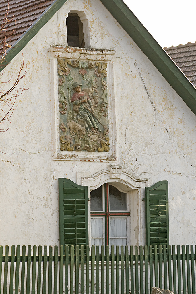 Szent Vendel népi lakóház most helytörténeti gyűjtemény azonosító: 7618 (törzsszám: 9593), Melchior Keller építtetett 1740 körül. Nevét a homlokzaton található, a pásztorok védőszentjét, Szent Vendelt ábrázoló nagyméretű domborműről kapta. [1] Cím: Pest megye, Zsámbék, Bicskei utca 12 (v 13) This is a photo of a monument in Hungary. Identifier: 7618